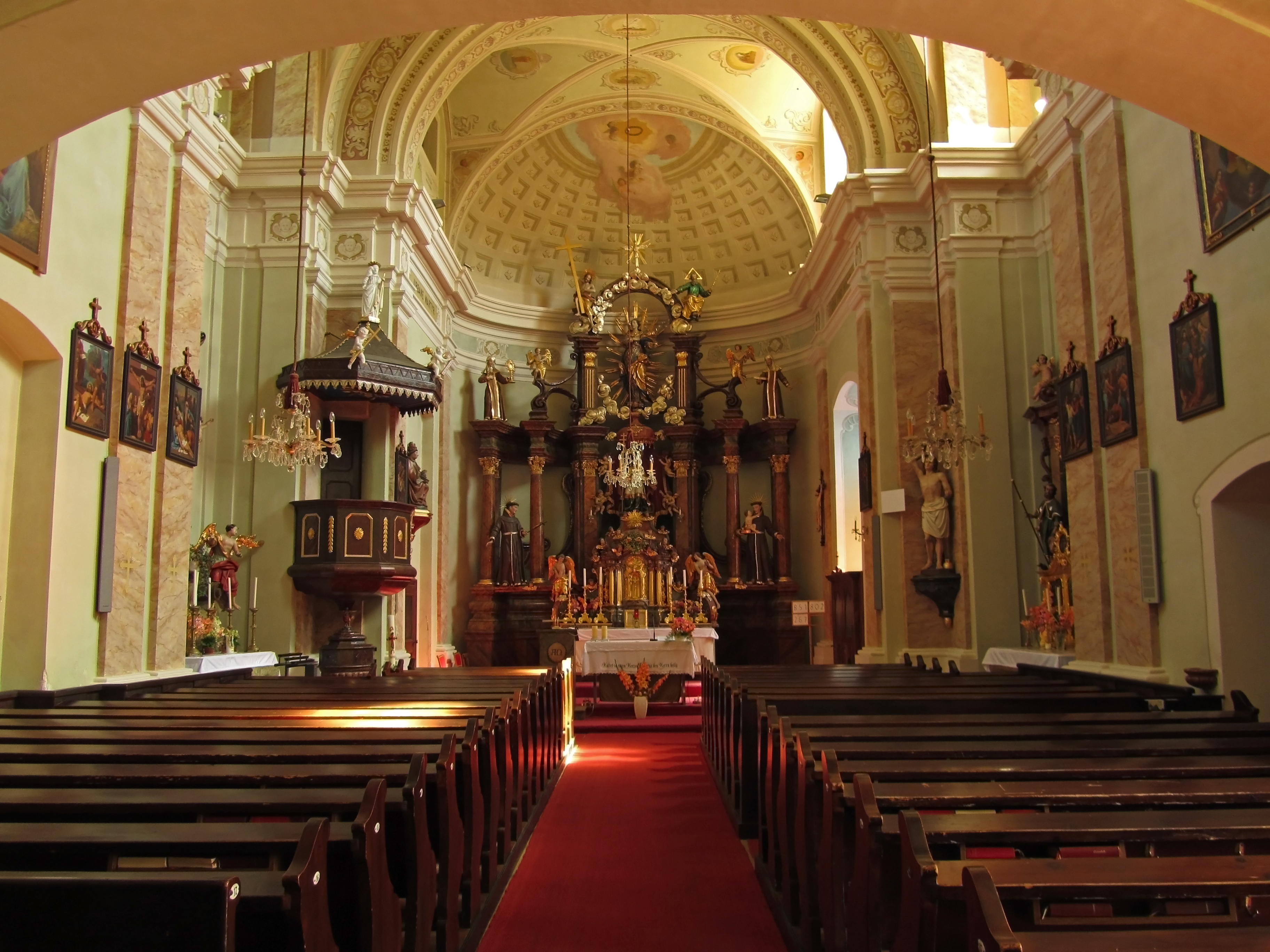 Die Pfarrkirche ist Sankt Urban geweiht. Der barocke Saalbau mit Rundapsis und vorgestelltem Westturm von 1840 liegt leicht erhöht inmitten des Ortes. Das Langhaus mit querschiffartiger Erweiterung und Chor unter gemeinsamem Dach ist durch Putzlisenen gegliedert und ist durch eingezogene Rundbogenfenster und ein südliches Rechteckportal mit Keilstein durchbrochen. Der vorgestellte, dreigeschossige Westturm mit profilierten Gesimsen ist im Erdgeschoß mit Putzquaderung ausgestattet, hat im zweiten Geschoß eine Ortsteineinfassung und im Glockengeschoß mit Eckpilastern, rundbogigen Schallfenstern und Haubendach. Östlich des Chors liegt ein Sakristeianbau. Das östliche Joch des dreijochigen Langhauses ist querschiffartig verbreitert. An das Langhaus anschließend liegt ein einjochiger, leicht eingezogener Chor mit Halbkreisapsis, der durch ein Kreuzgratgewölbe über gekuppelten auf flacher Pilaster- bzw. Doppelpilastergliederung mit umlaufendem Gesims gedeckt ist. Zur Ausstattung der Kirche zählen neben dem mit 1736 bezeichneten Hochaltar unter anderem auch zwei Seitenaltäre, ein prunkvoller Tempiettotabernakel, ein mit 1715 bezeichneter Opferstock, Heiligenstatuen und andere Kunstwerke.